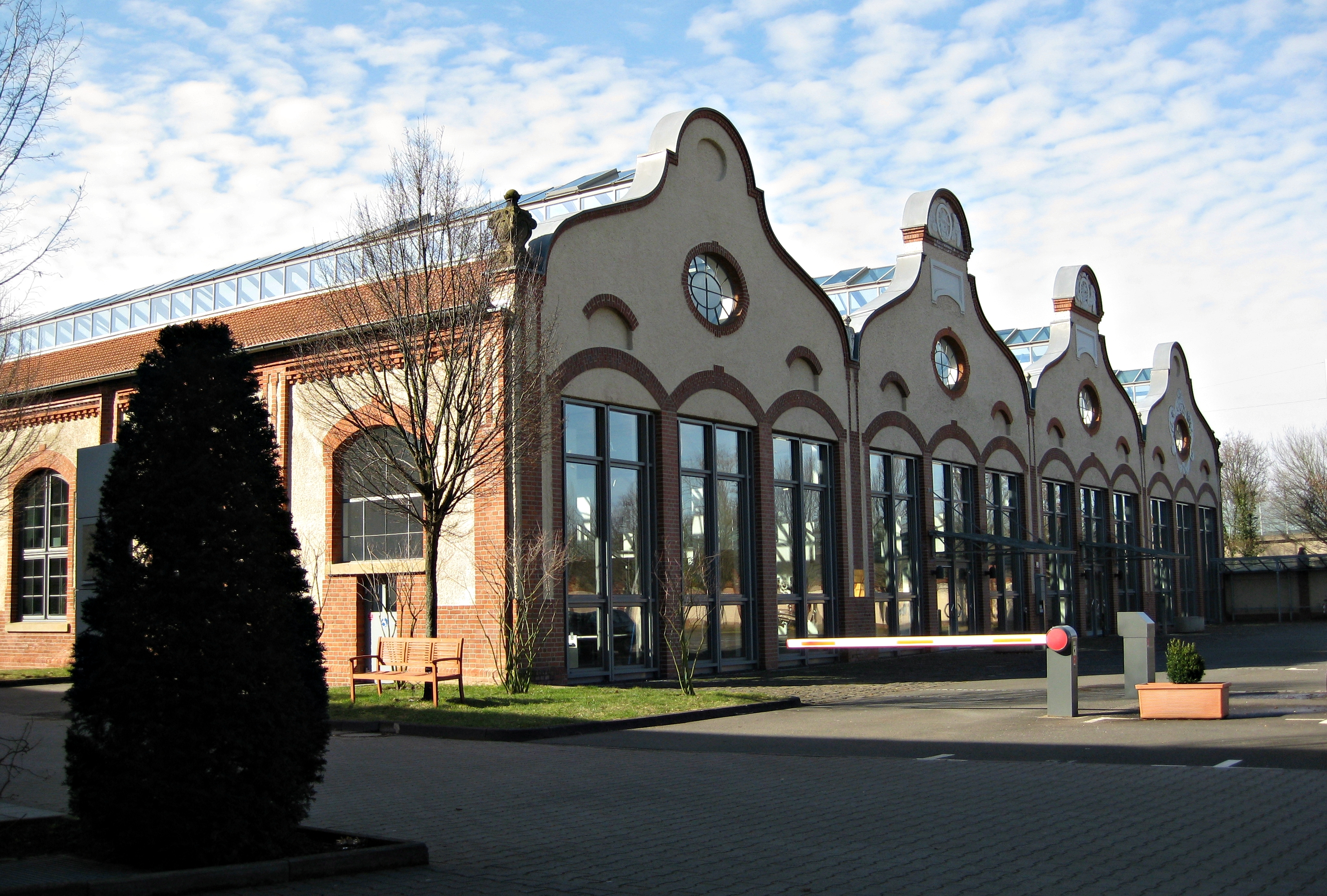 Deutschland, Bonn, Graurheindorfer Str. 157: Bonner Sitz der Kultusministerkonferenz (KMK) im ehemaligen Straßenbahndepot; Vorderansicht. This is a photograph of an architectural monument. 1747